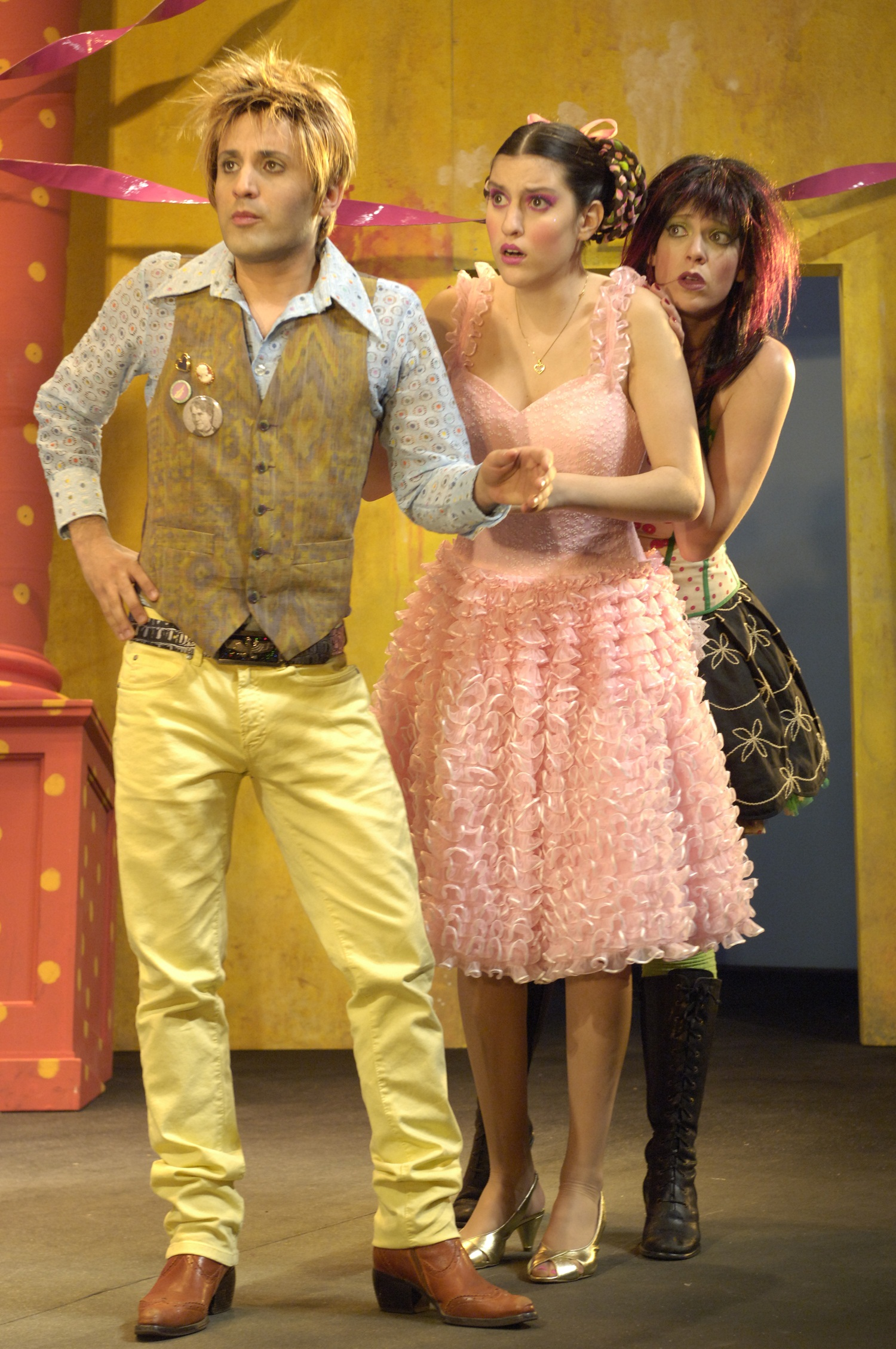 שירי גדני בהצגה משרתם של שני אדונים